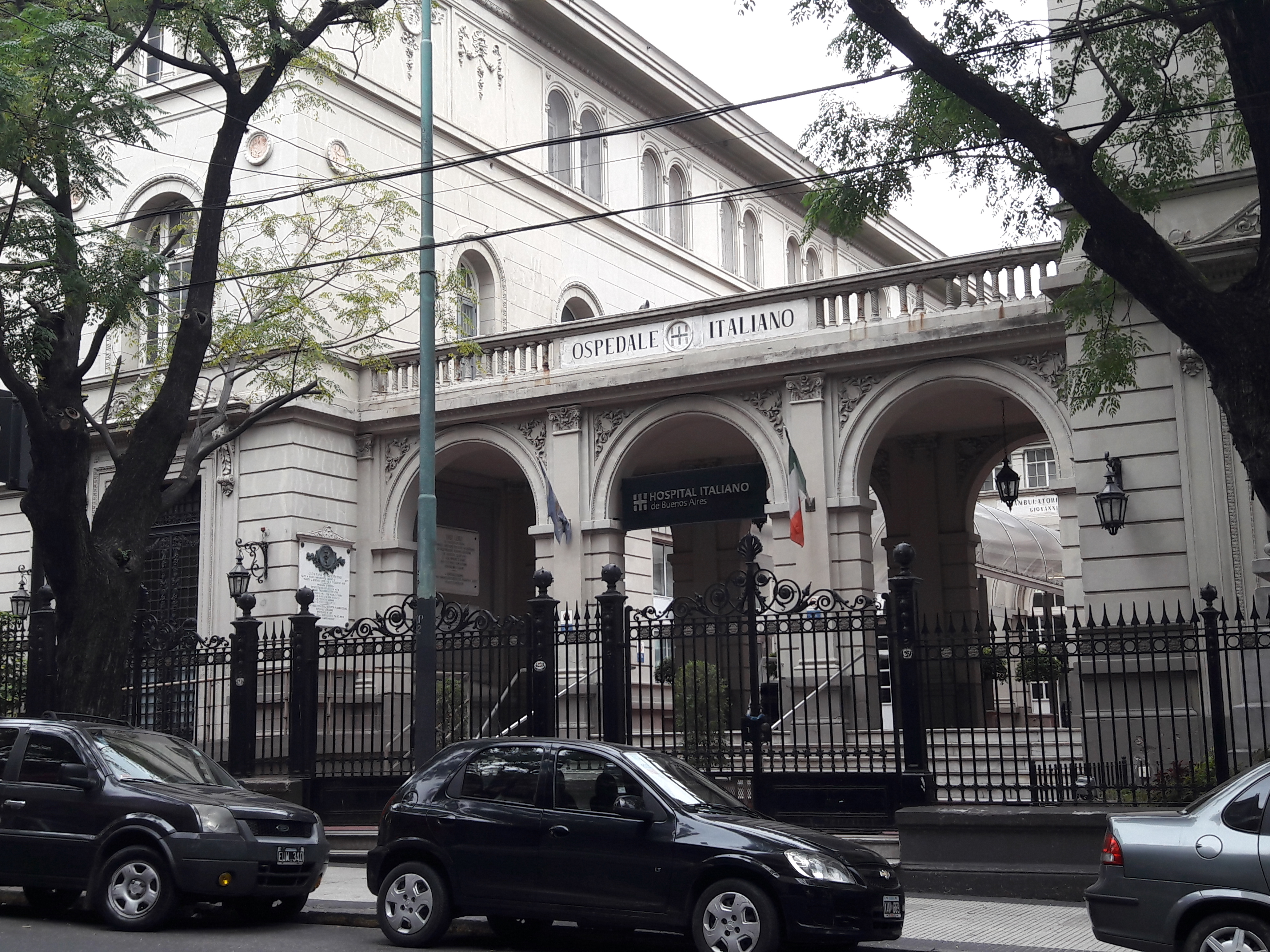 Hospital Italiano de Buenos Aires, Almagro, Buenos Aires, Argentina.